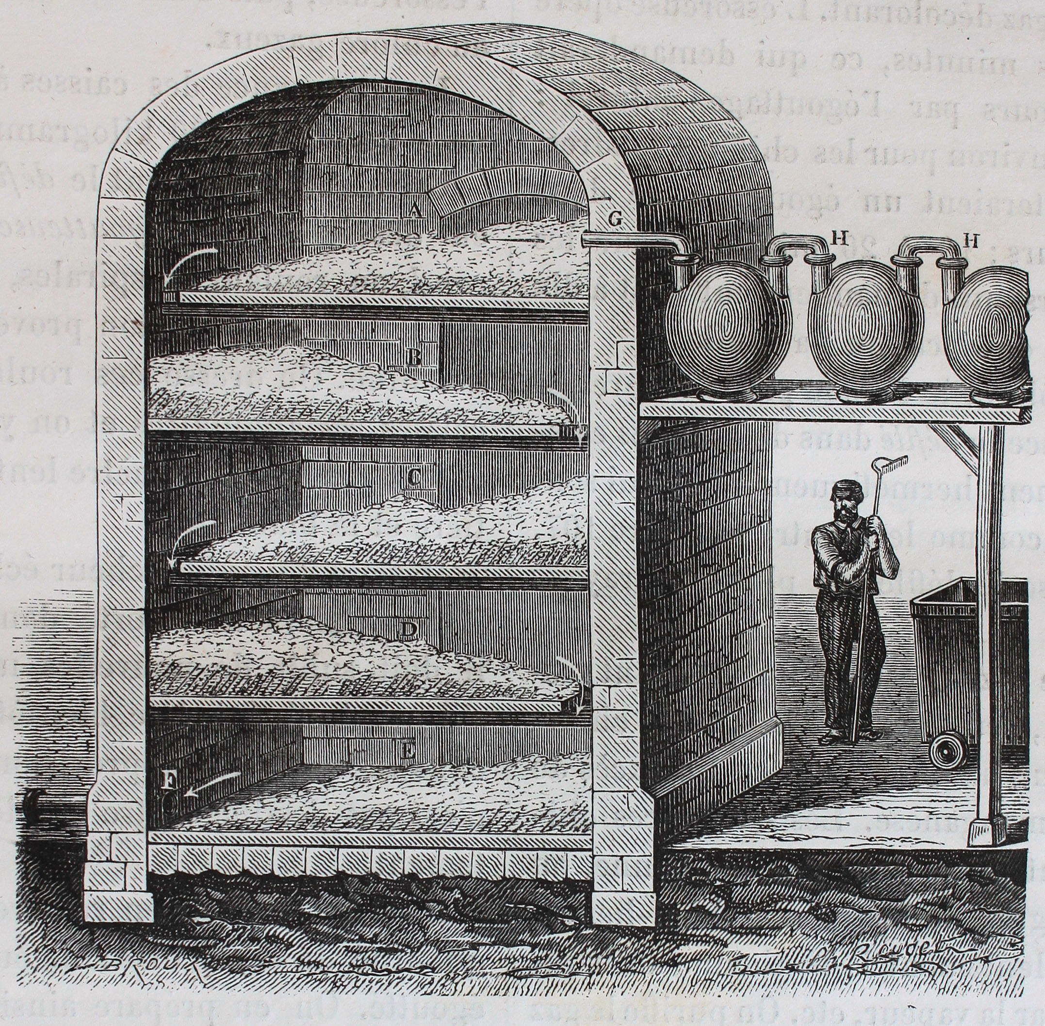 "Coupe de la chambre à blanchiment par le chlore gazeux. H. Bonbonnes contenant de l'eau pour laver le chlore gazeux ; G, entrée du chlore dnas la chambre A. B, C,D, E, plancher superposés recevant le défilé ; F, sortie de l'air". Ilustraciones de la obra : Les merveilles de l'industrie ou, Description des principales industries modernes / par Louis Figuier. - Paris : Furne, Jouvet, [1873-1877]. - Tome II